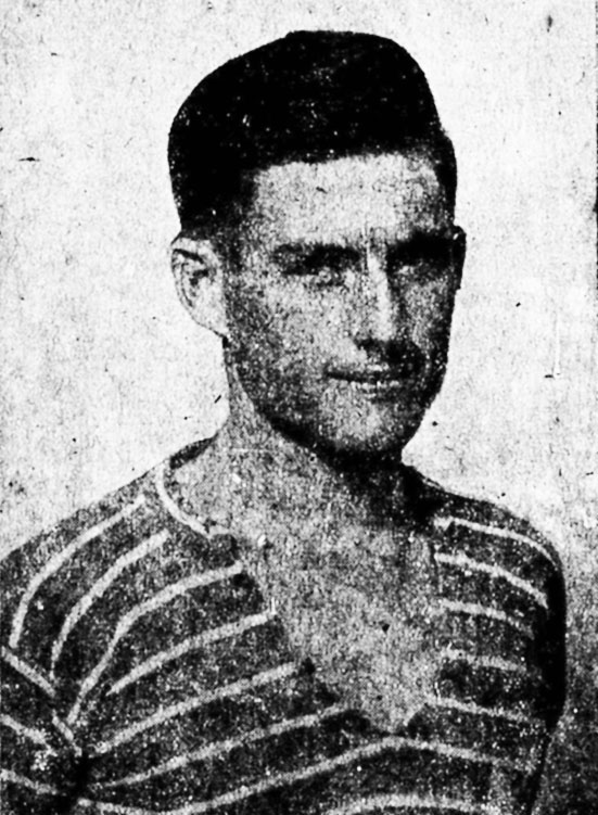 Ο Άγγελος Μεσσάρης το 1930